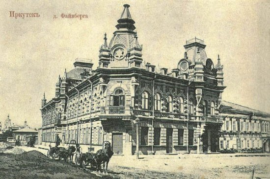 г. Иркутск. Дом Файнберга